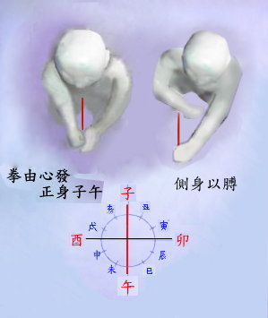 詠春拳子午線